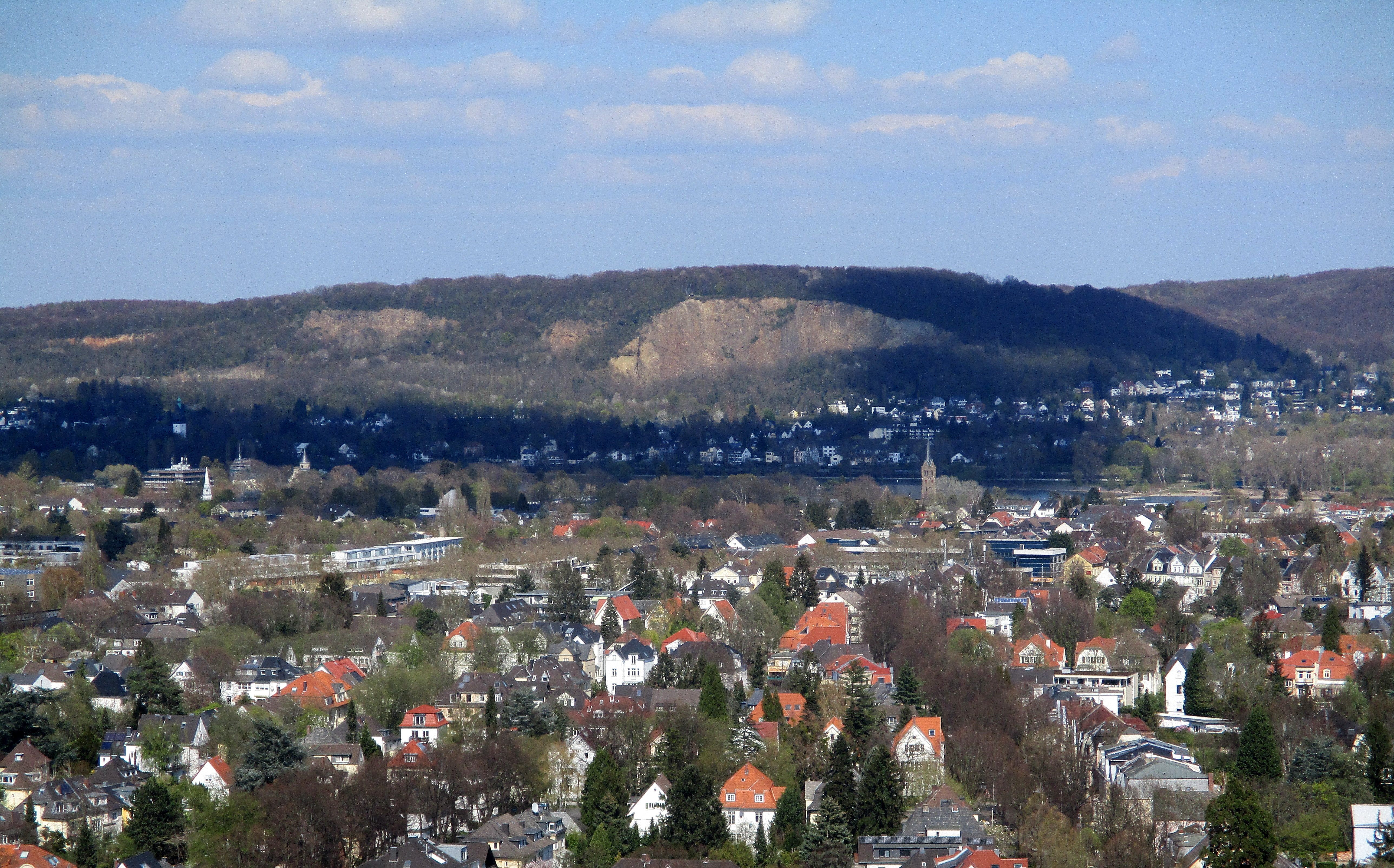 Blick vom Bergfried der Godesburg in Richtung Kuckstein (rechts) und Rabenlay (links)